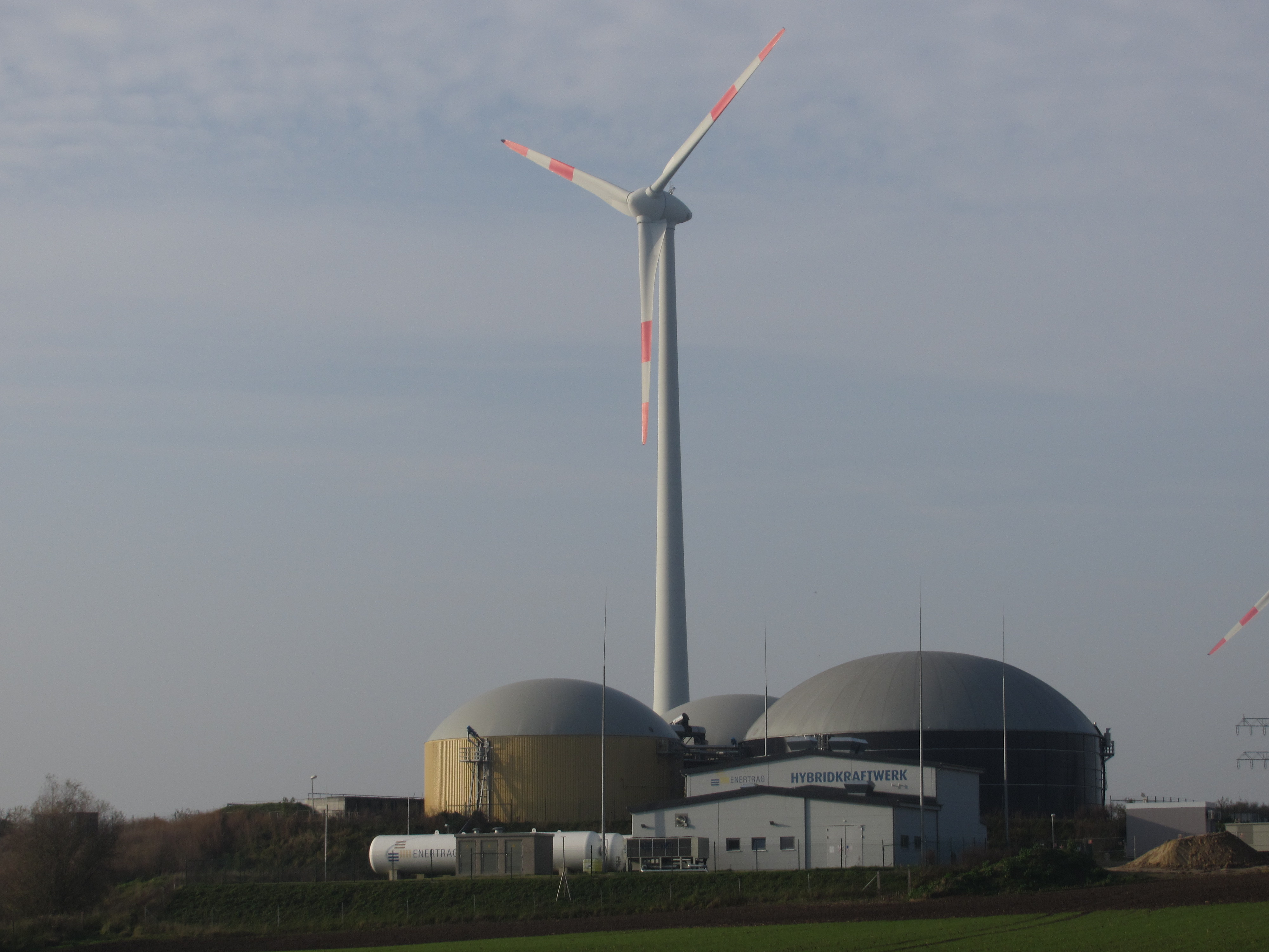 Hybridkraftwerk-hybrid-power-plant-Windkraftanlage-WKA-bei-Prenzlau